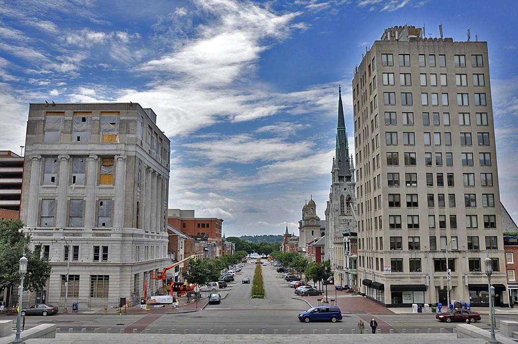 State Street in Harrisburgh